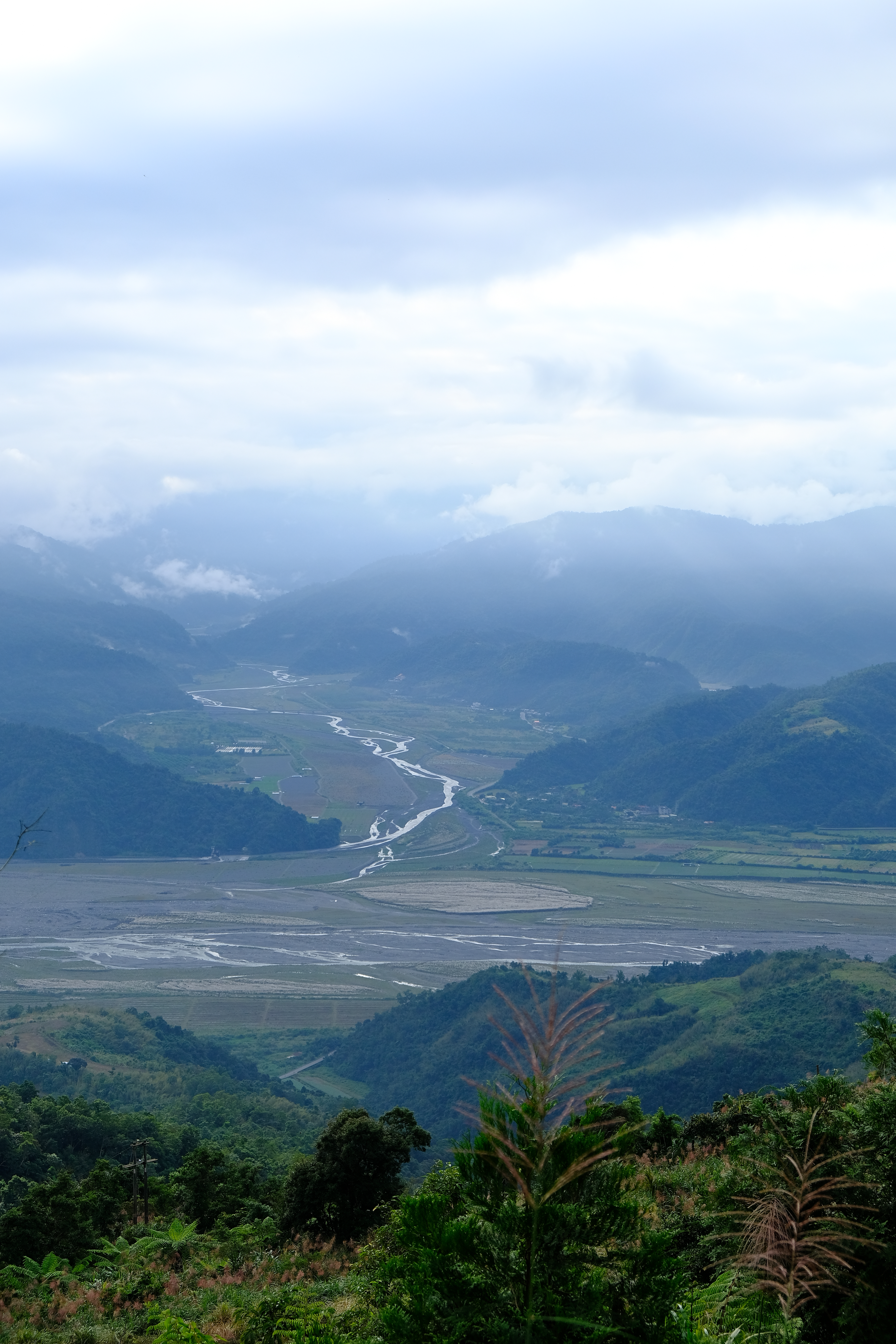 2018 Le confluent de Qingshui rivière et Lanyang rivière 宜蘭縣 清水溪與蘭陽溪匯流處